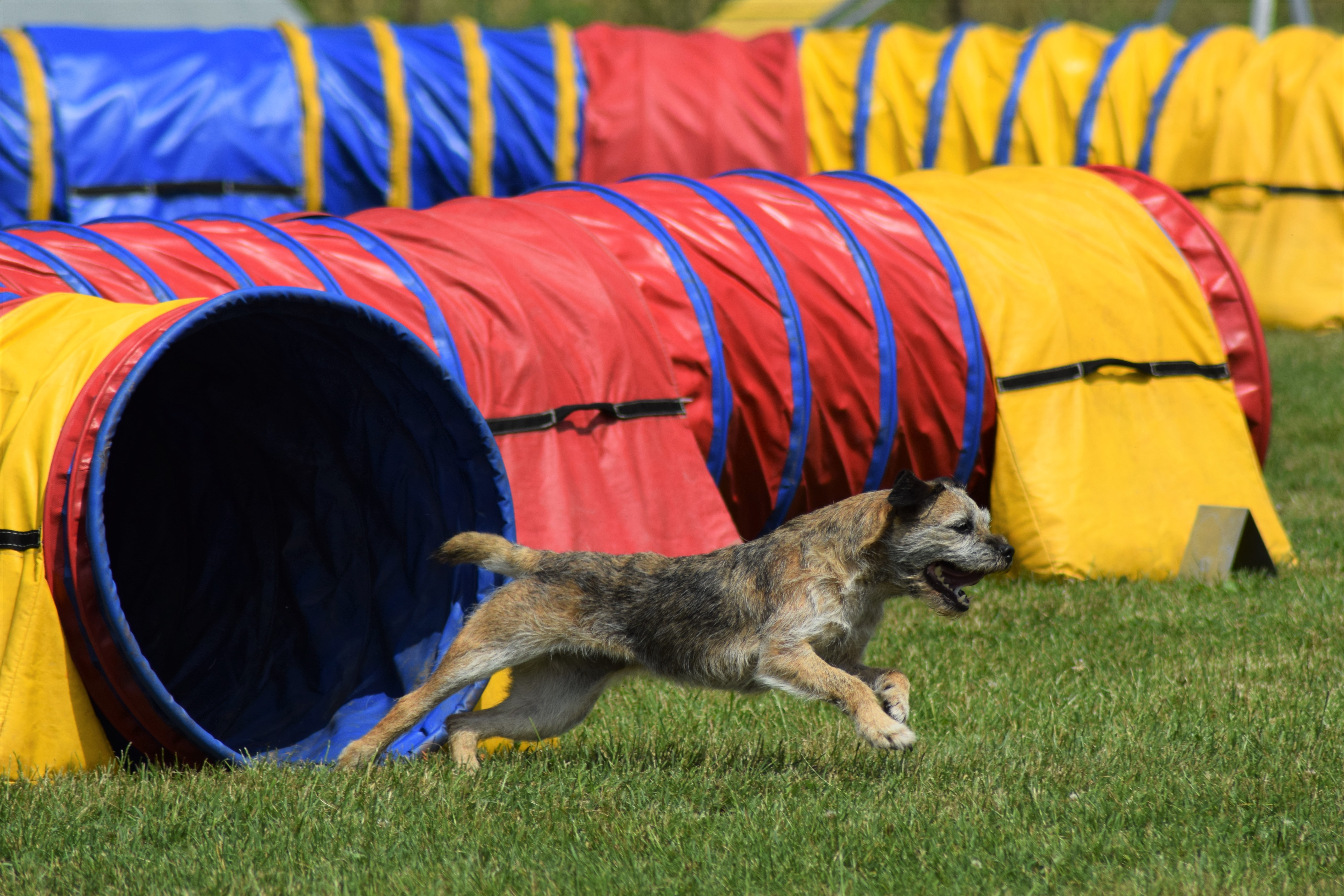 Border teriér na agility tréninku